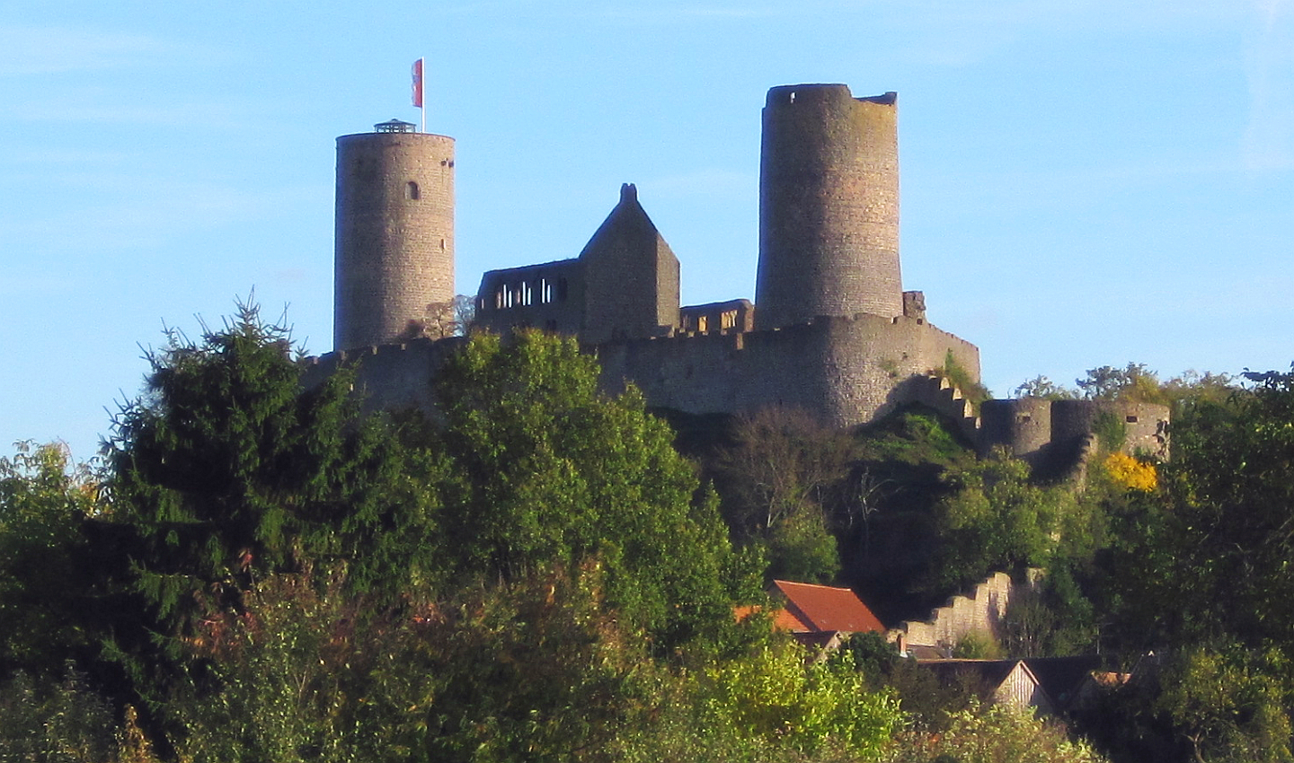 Burg Münzenberg, erbaut vor 1162, Burgruine, ehem. Bauwerk mit Basaltquadermauerwerk. War im Besitz derer von Arnsburg, von Falkenstein bis von Solms-Lich, heute staatlich - Foto Wolfgang Pehlemann IMG_4926